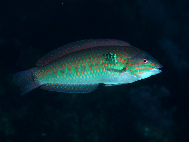 キュウセン Parajulis poecileptera